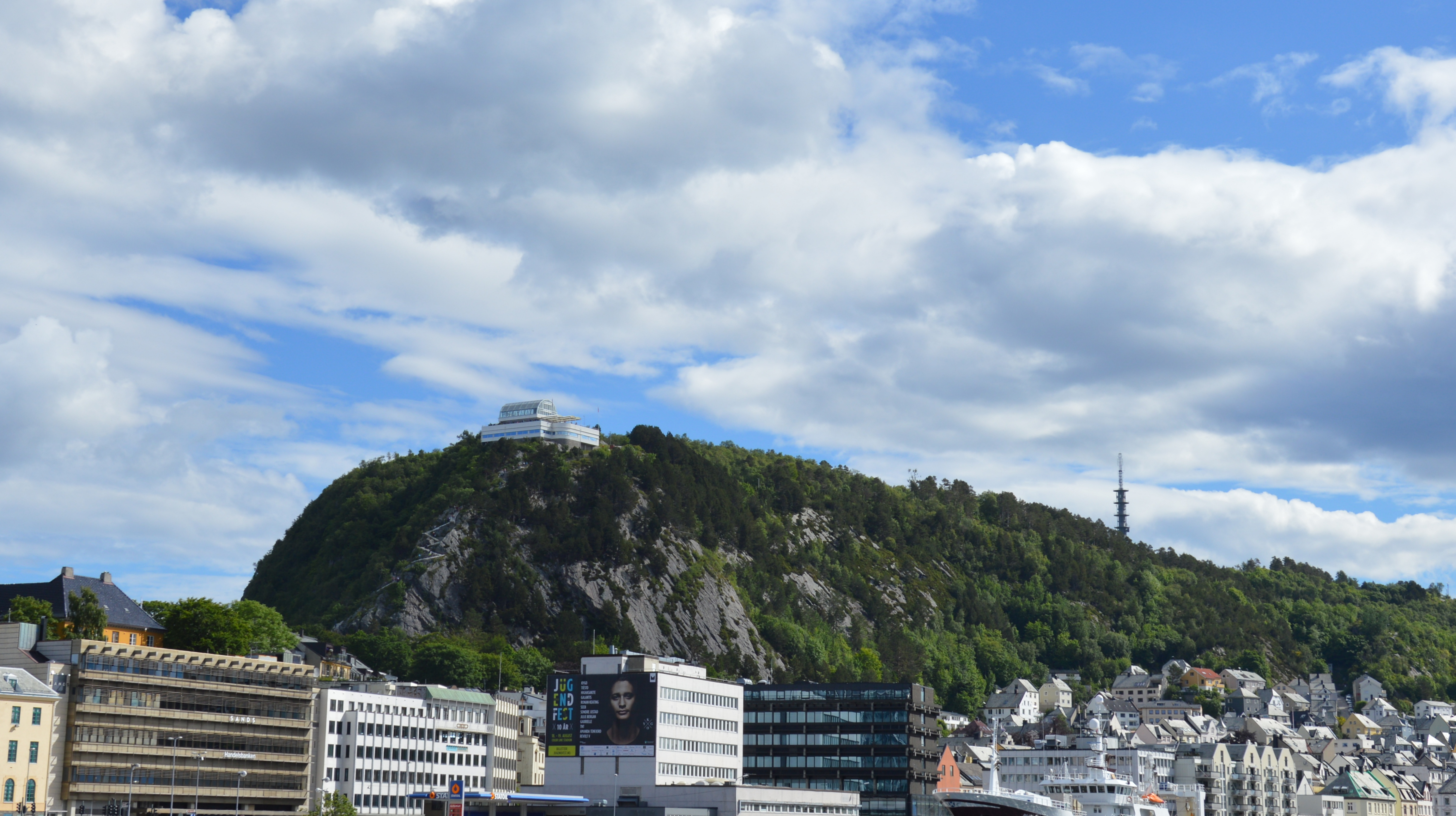 Fjellstua Blick von Alesund